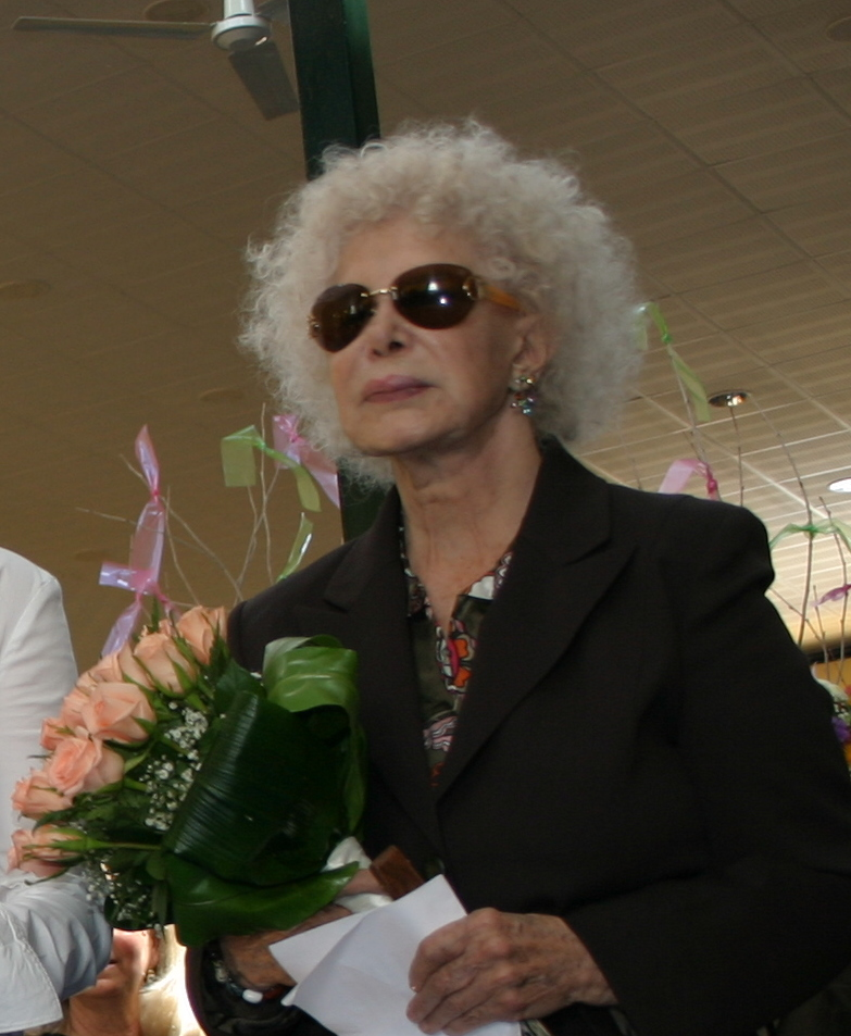 Feria Nacional de Jardinería de Espartinas. Edición 2005. Visita de la Duquesa de Alba.